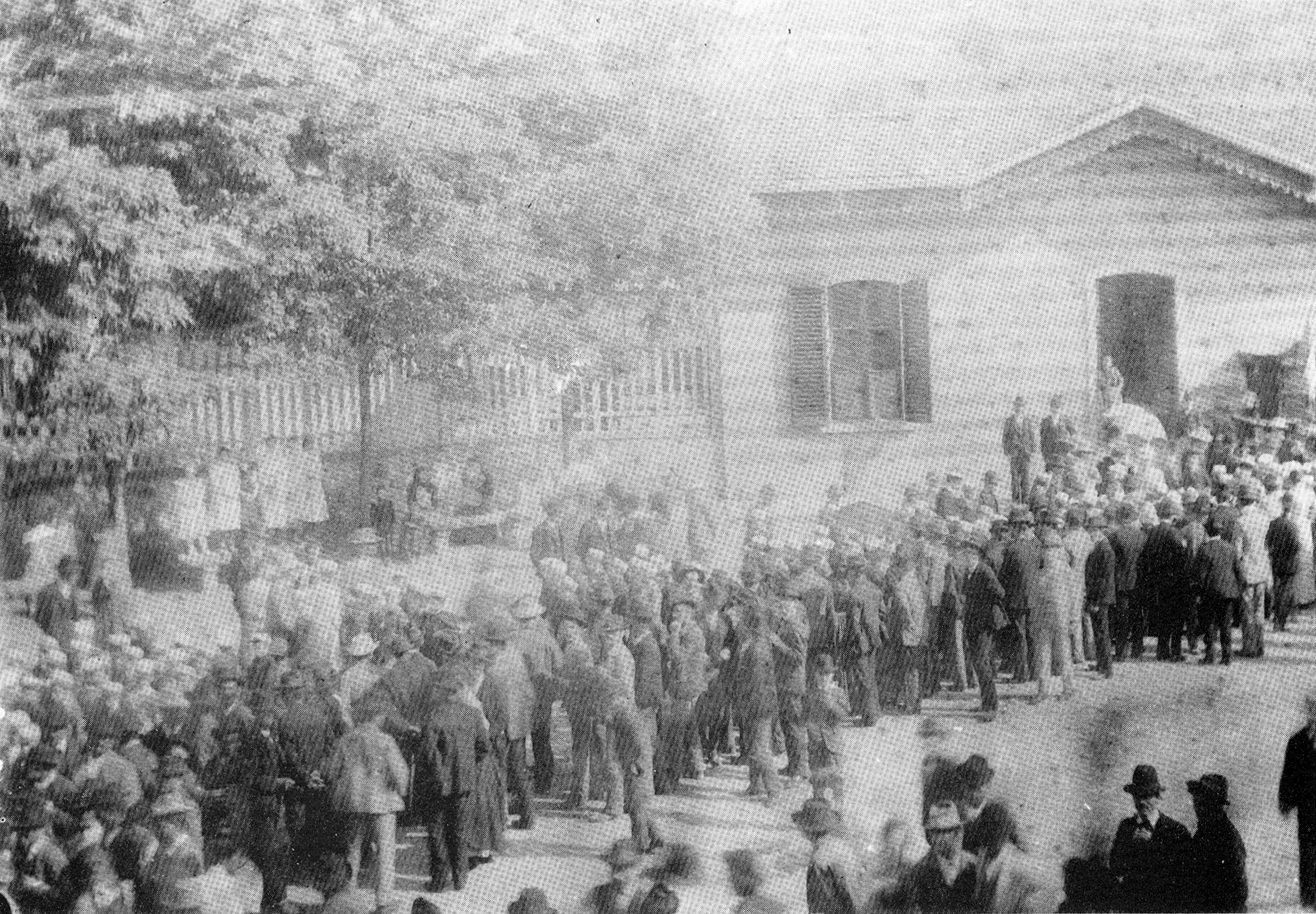 Esterno della stazione tranviaria di Greve in Chianti ripresa il giorno della sua inaugurazione 1893